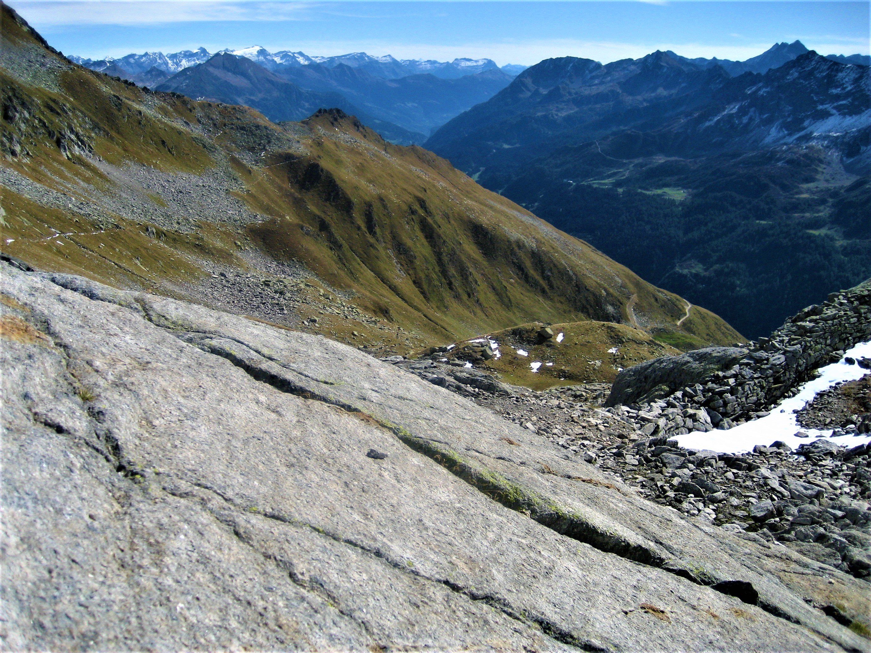 Berglandschaft Lucendro